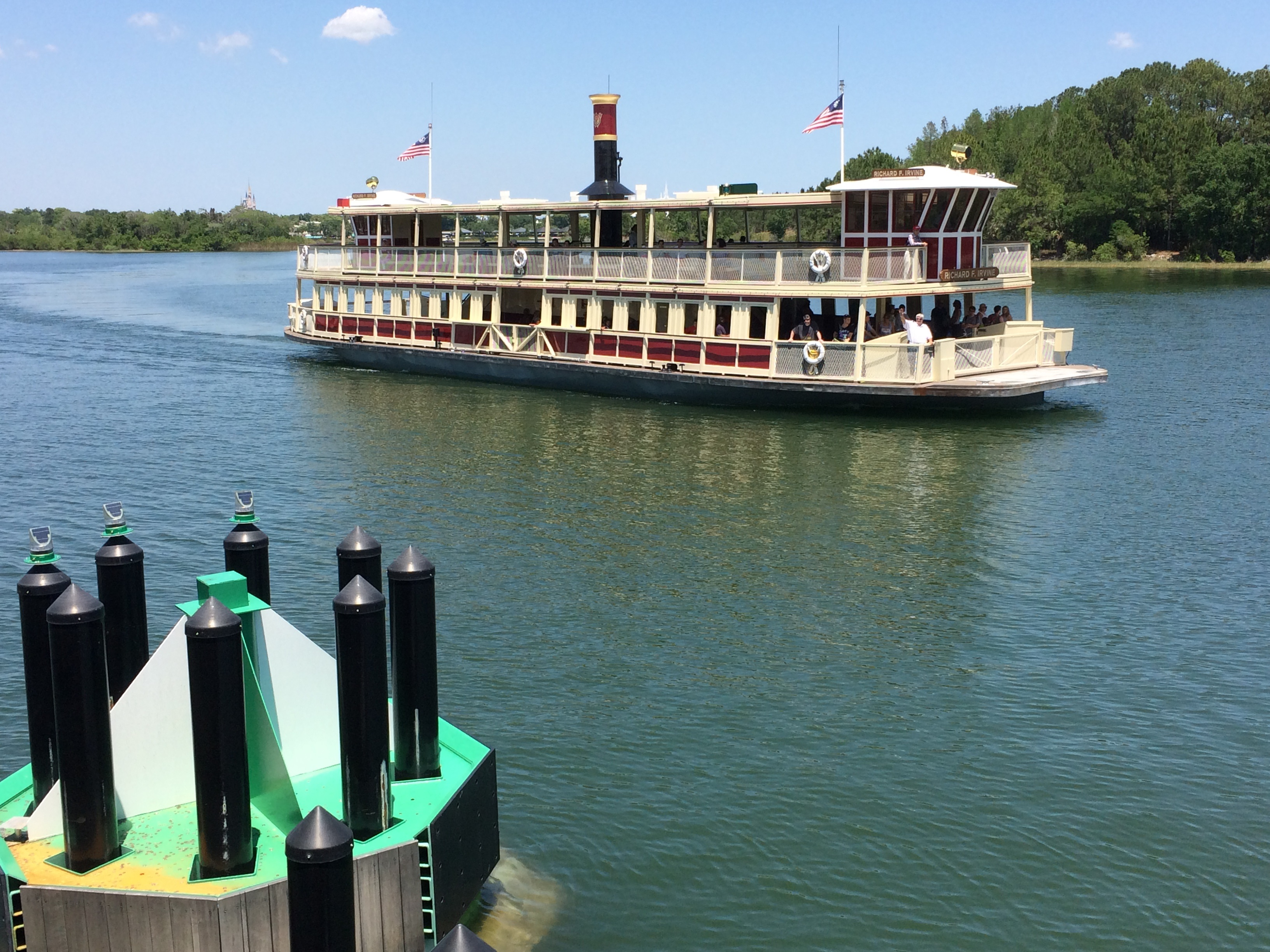 Florida vacation spring 2016